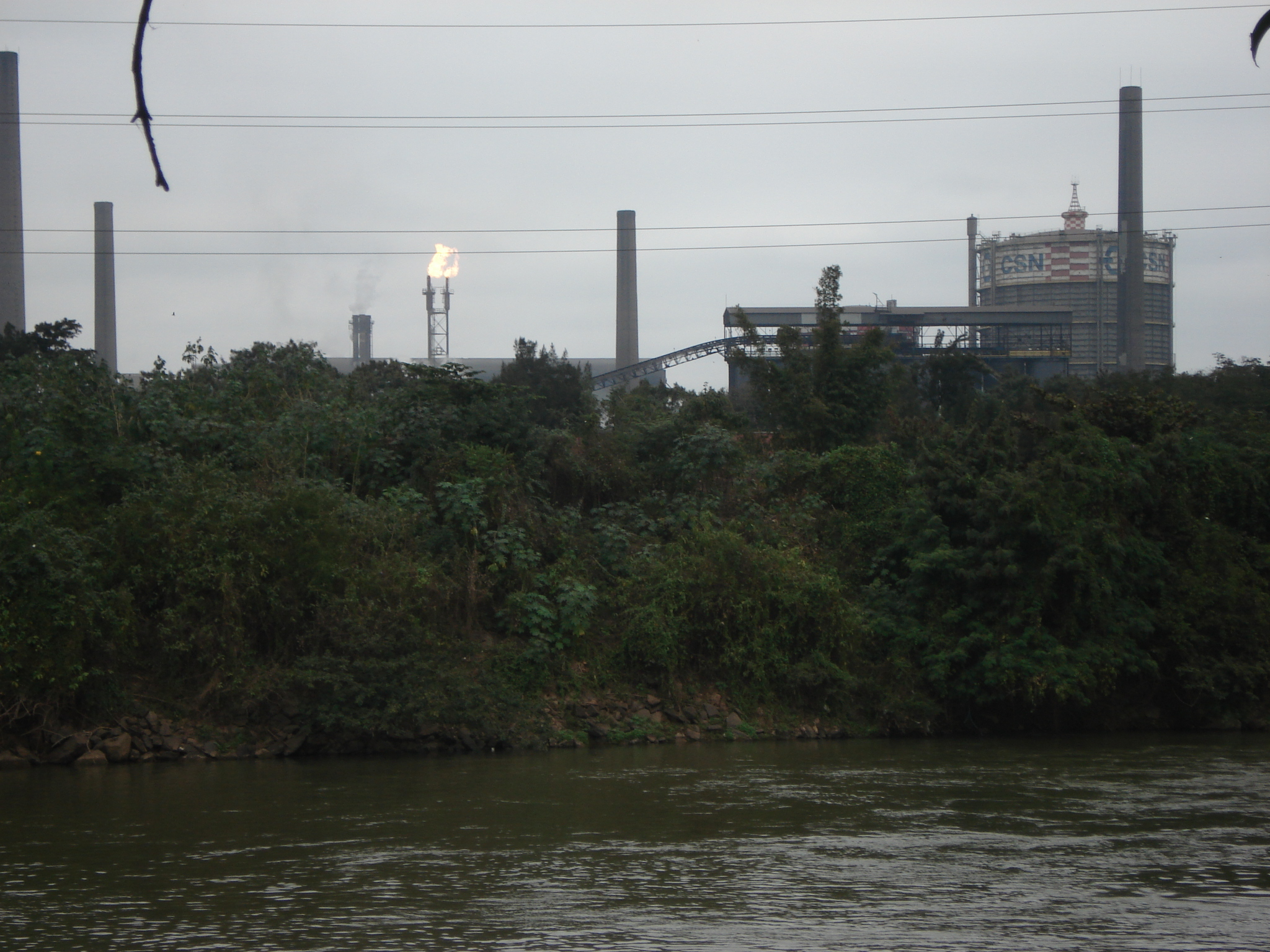 Av. Beira Rio - Volta Redonda